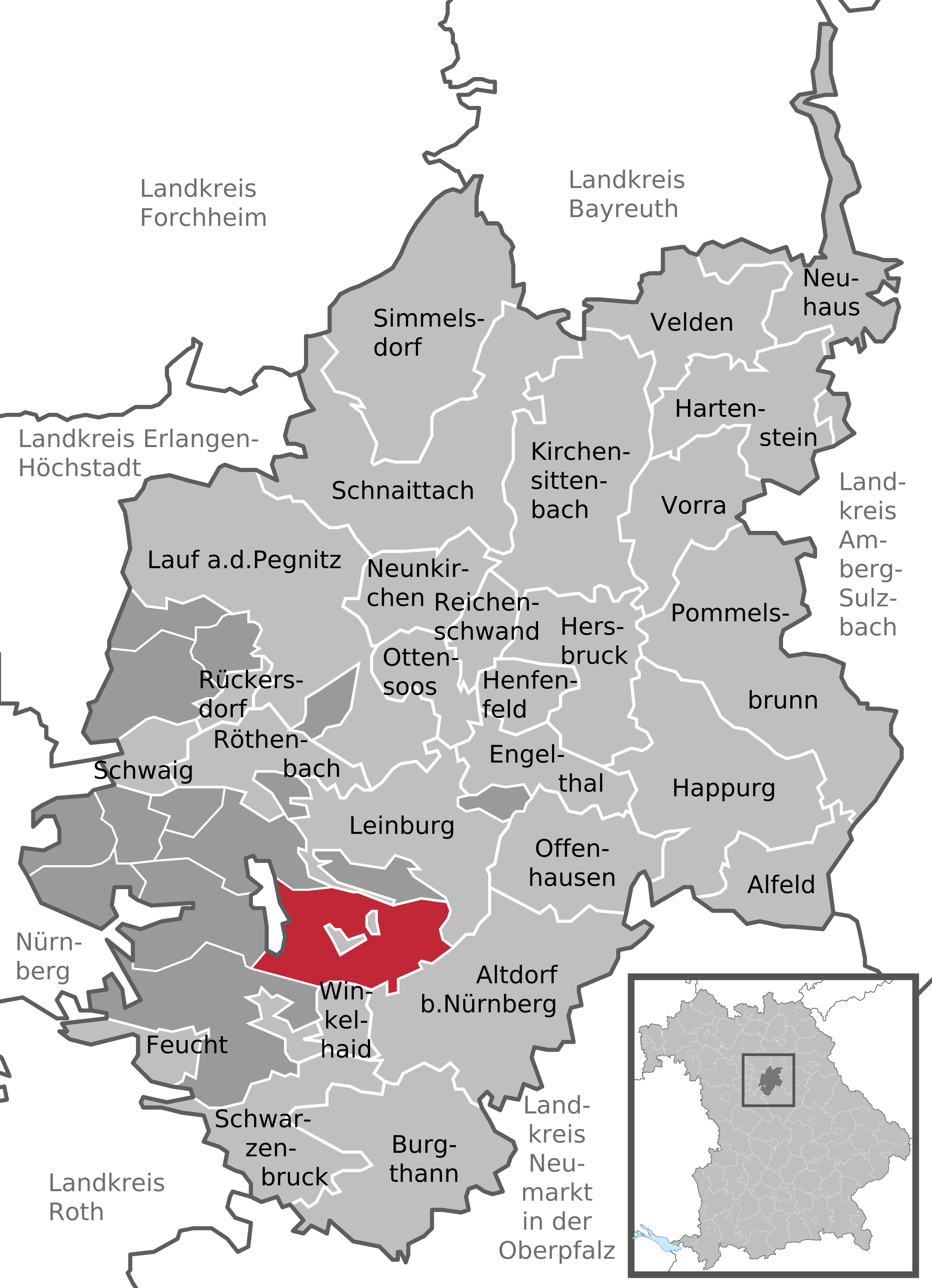 Positionskarte des Gemeindefreien Gebietes Winkelhaid